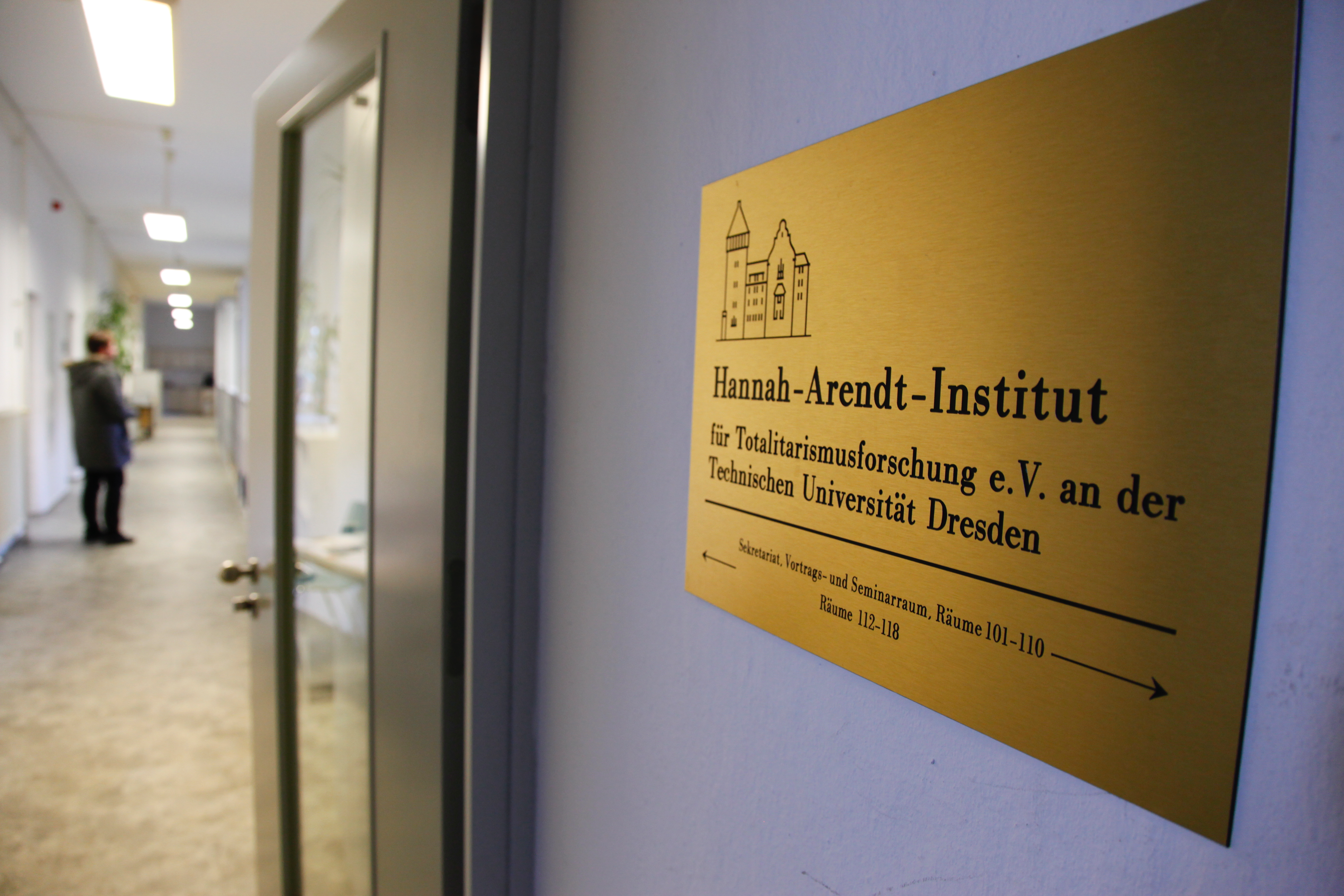 Hannah-Arendt-Institut für Totalitarismusforschung Dresden